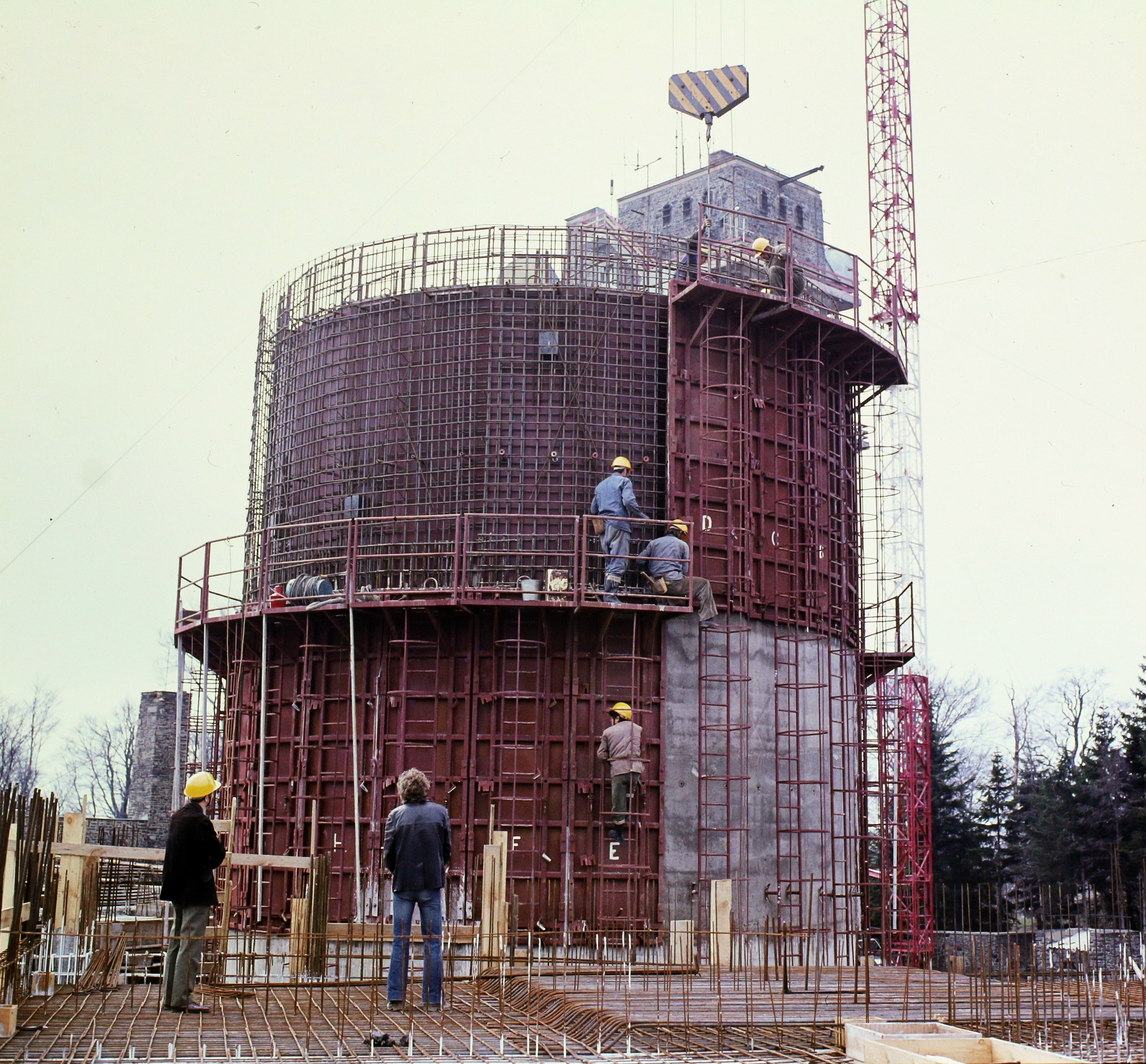 épül az új Tv adótorony, háttérben az 1958-ban épült antenna torony. Location: Hungary Tags: colorful, construction, tower Title: épül az új Tv adótorony, háttérben az 1958-ban épült antenna torony.